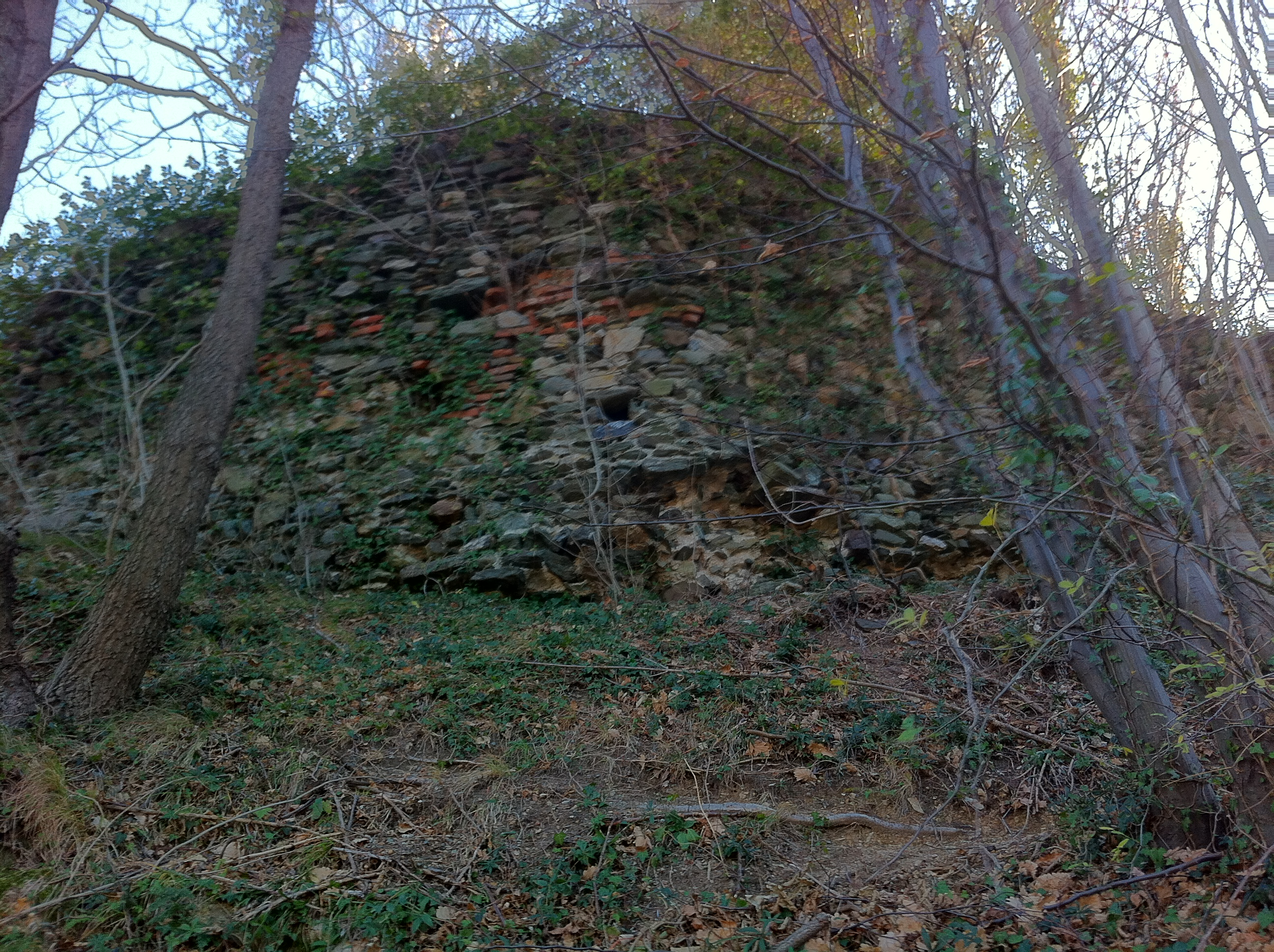 Castello di Stella (SV), porzione di cinta muraria interna, lato nord